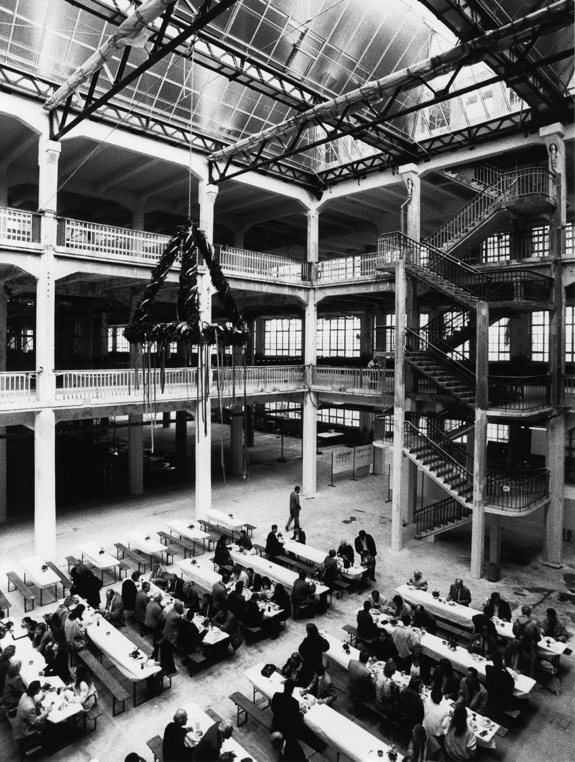 Zentrum für Kunst und Medien Karlsruhe im September 1995